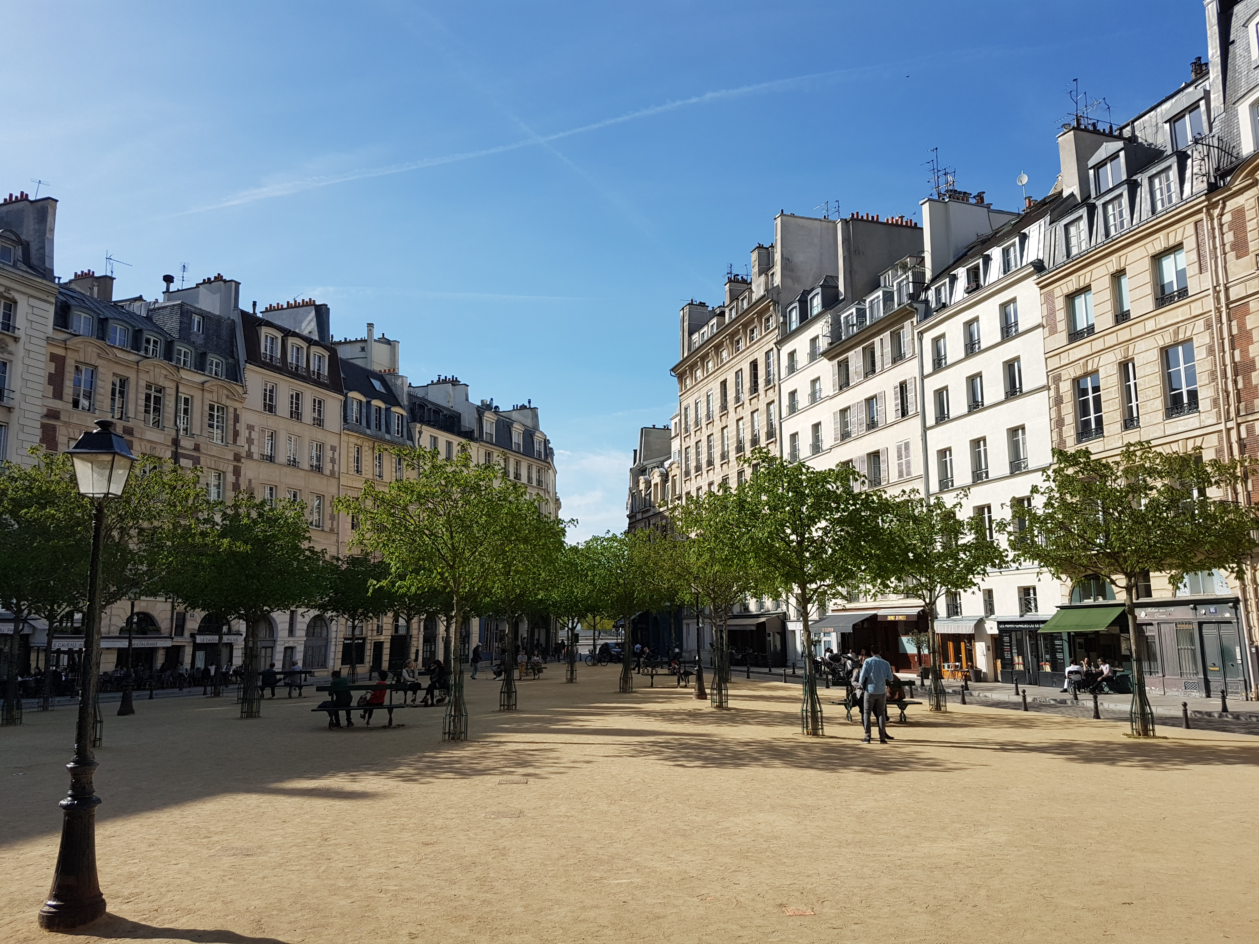 Square de la place Dauphine à Paris, en mars 2017